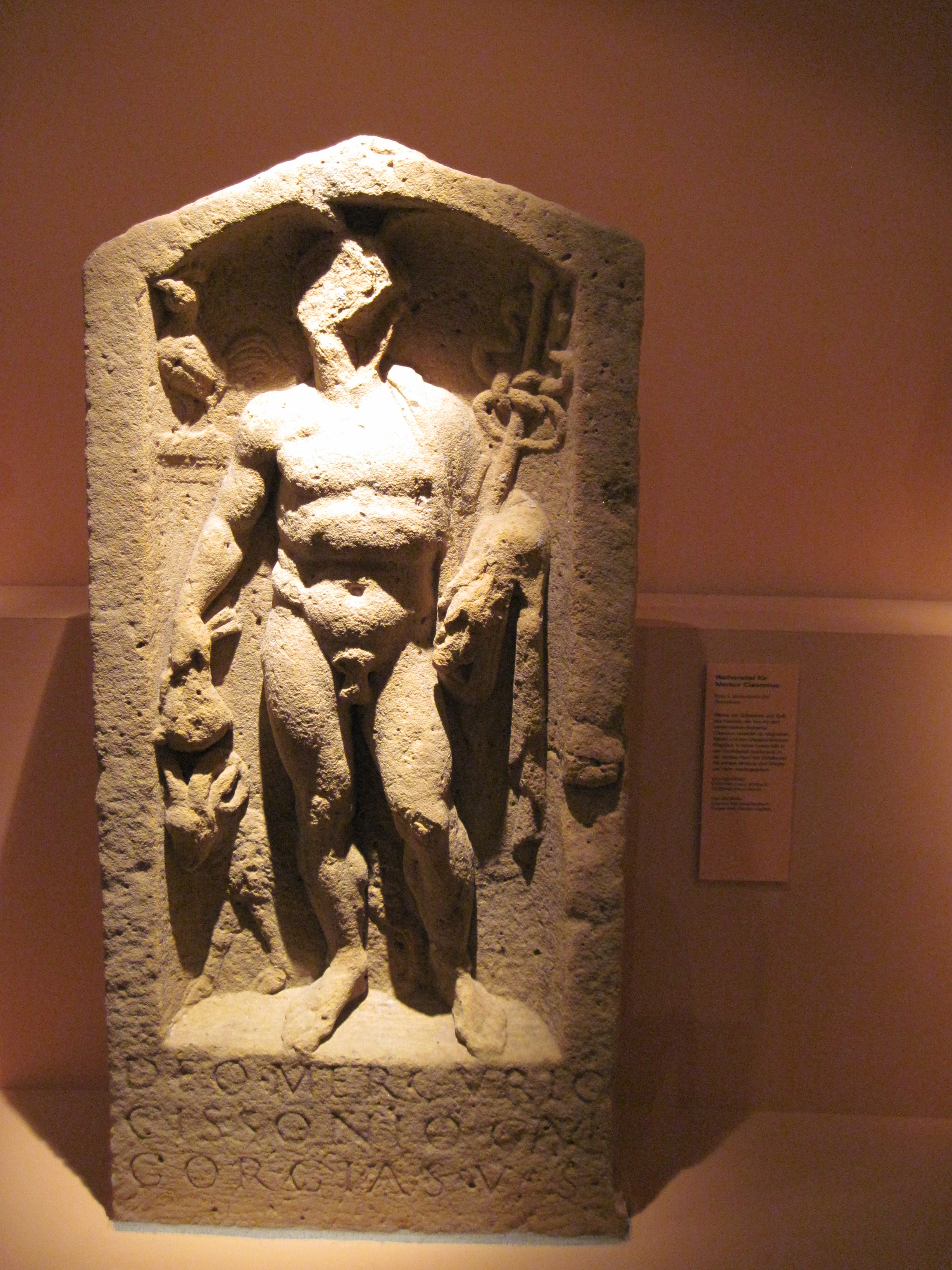 Interlingua: Basse relievo del deo gallic Mercurio Cissonio (Speyer). CIL XIII, 6085 Rheinzabern (Tabernae), Provinz Germania superior: Deo Mercurio / Cissonio C(aius) Atu[l(ius)] / Gorgias v(otum) s(olvit)